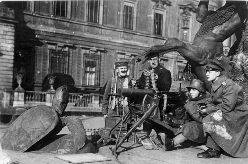 Revolution 1918 vor dem Berliner Schloss